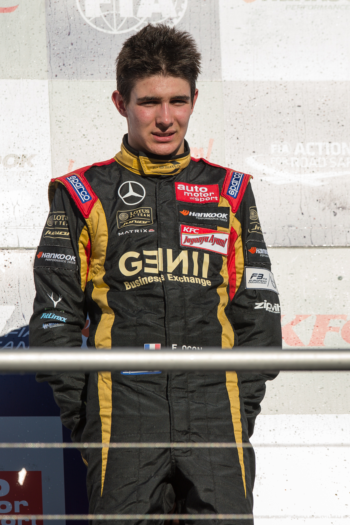 DTM,Deutsche Tourenwagen Masters,Esteban Ocon,F3 FIA European Championship,FIA Formel 3 Europameisterschaft,Hockenheimring,Motorsport,Prema Powerteam,Siegerehrung